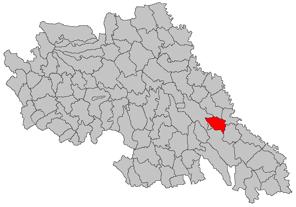 Categorie:Hărţi ale judeţului Iaşi